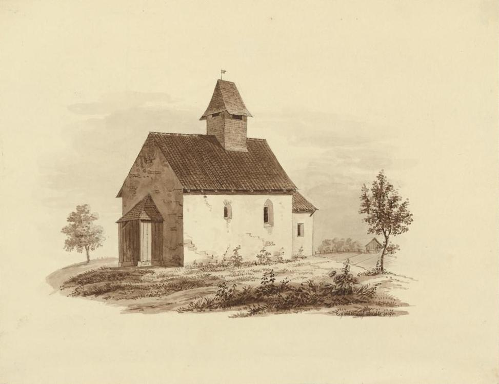 Oswalds-Capelle in der Breite ob Nürensdorff im Zürichbiet auf einer Zeichnung Ludwig Schultheſs’.